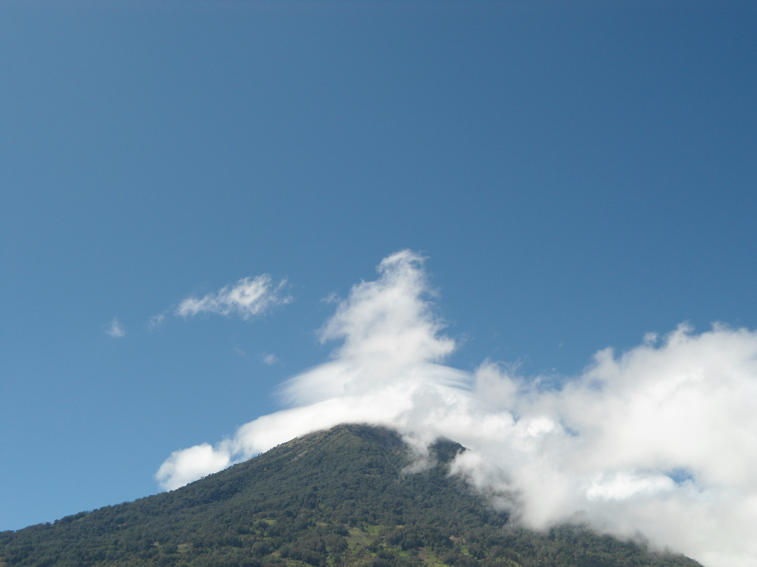 Volcán de agua